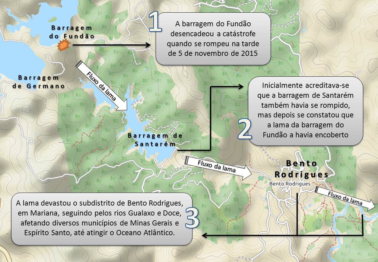 Esquema do rompimento de barragem em Bento Rodrigues